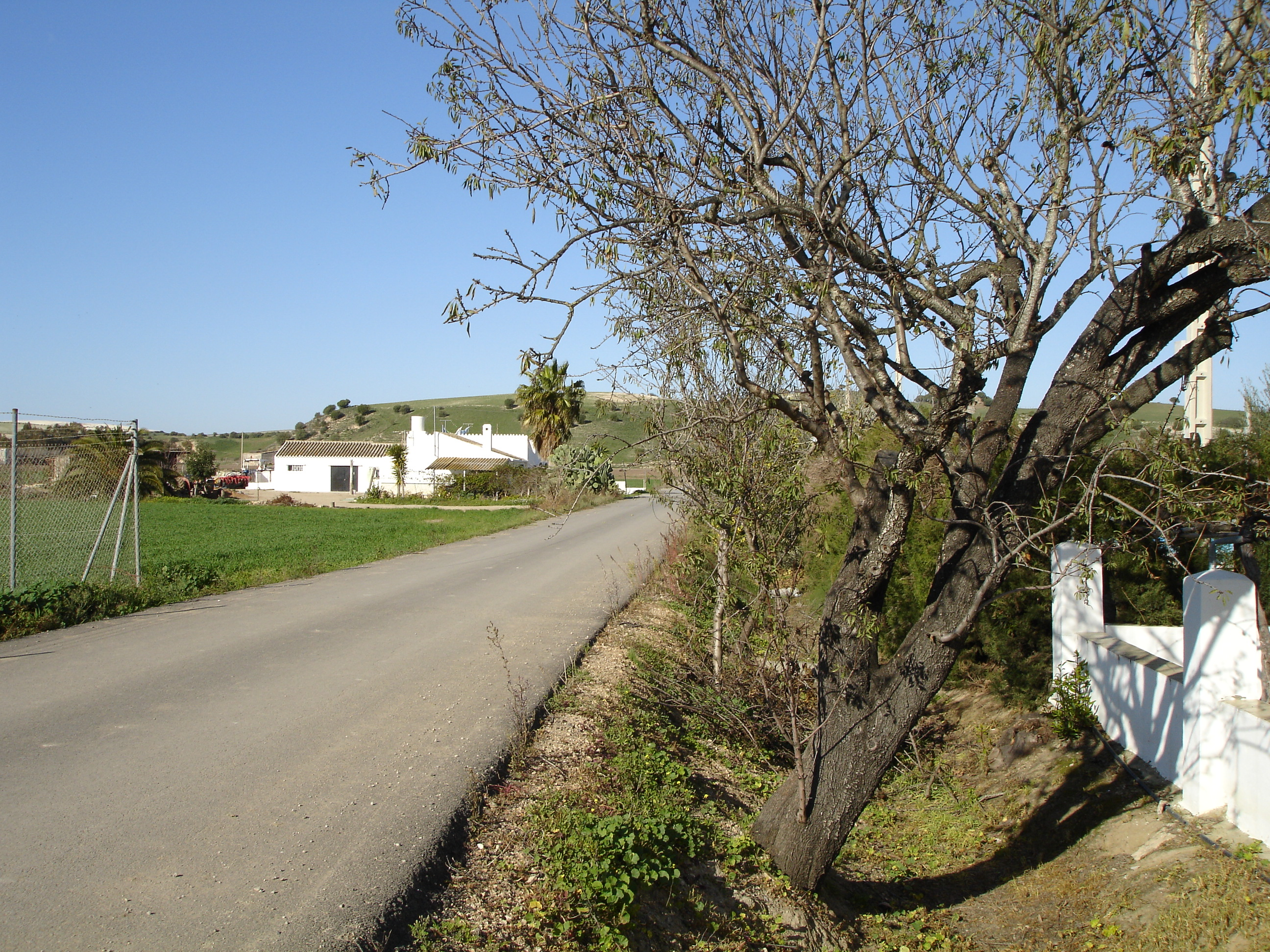 La Greduela, Jerez (Spain)